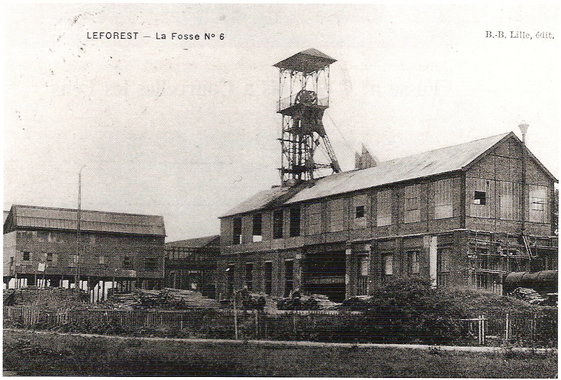 La Fosse n° 6 de la Compagnie des mines de l'Escarpelle était un charbonnage constitué d'un seul puits situé à Leforest, Pas-de-Calais, Nord-Pas-de-Calais, France.